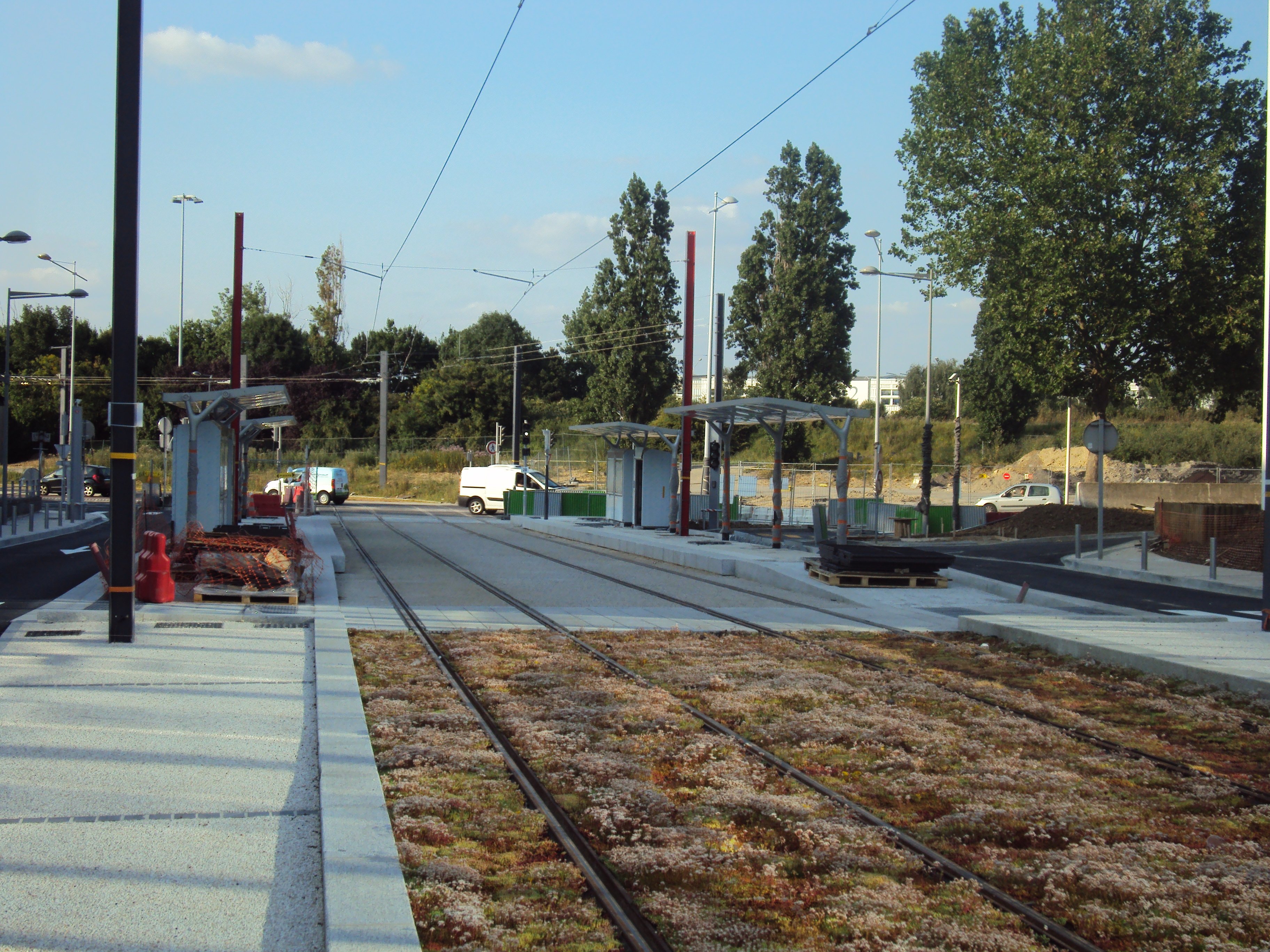 Travaux T7 à Rungis